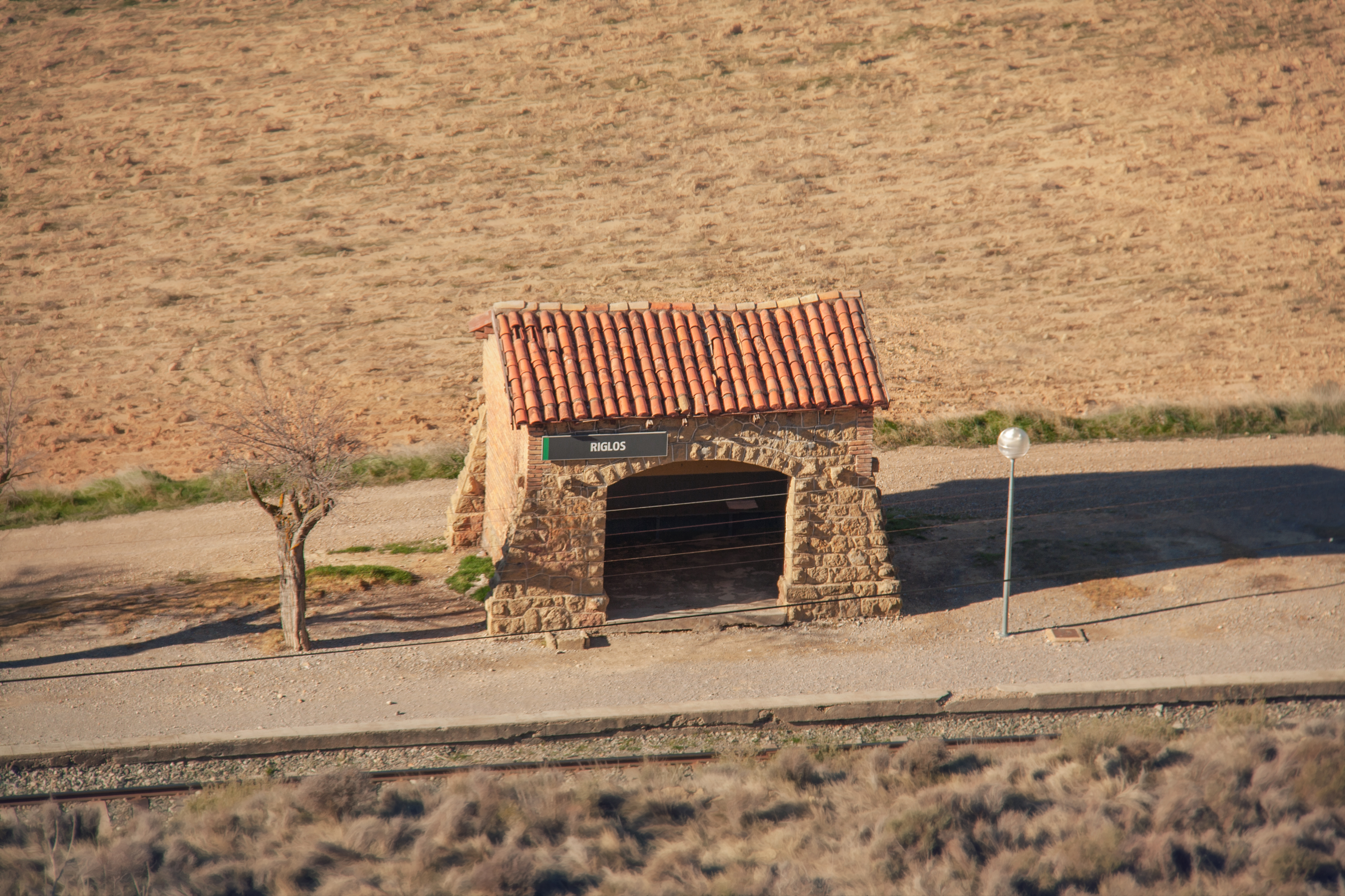 Riglos, España